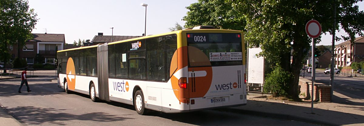 West-Bus in Ratheim